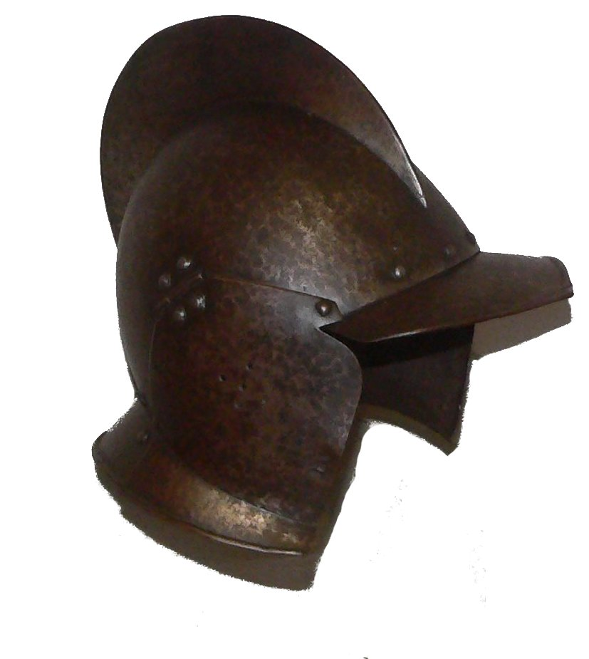 Bourguignotte, Europe centrale, 2e moitié du XVIe siècle.